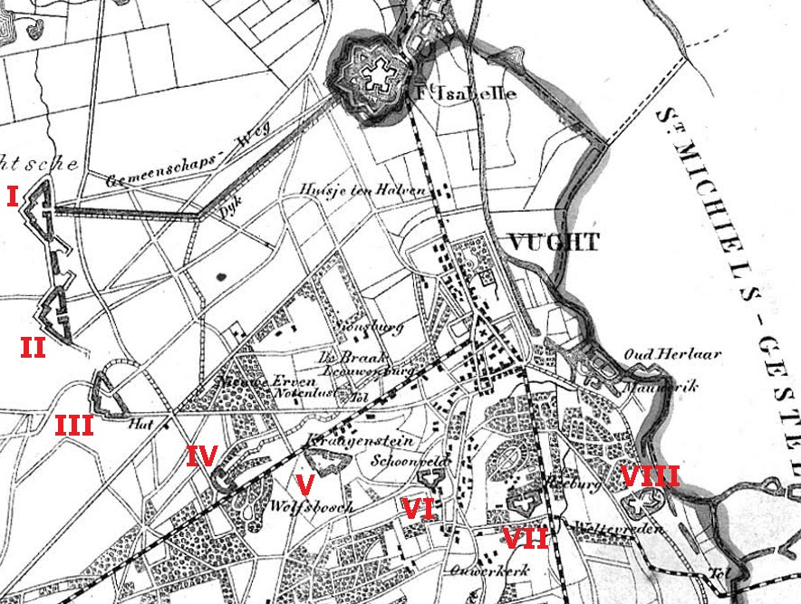 Uitsnede uit kaart van Gemeente Vught uit 1866 met in rood de nummering van de lunetten.